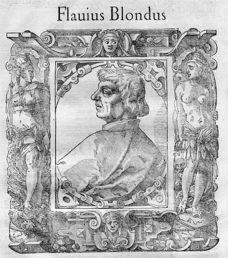 Flavio Biondo (Flavius Blondus; 1392 - 1463), italienischer Rennaissance-Humanist Holzschnitt-Portrait von 1577 oder früher aus: Paolo Giovio - Elogia Virorum literis illustrium. - Basel, Petri Pernae, 1577 mit reicher ornamentaler Umrahmung Blatt-Format: ca. 33,5 x 21,5 cm Bild-Format: ca. 16 x 15 cm